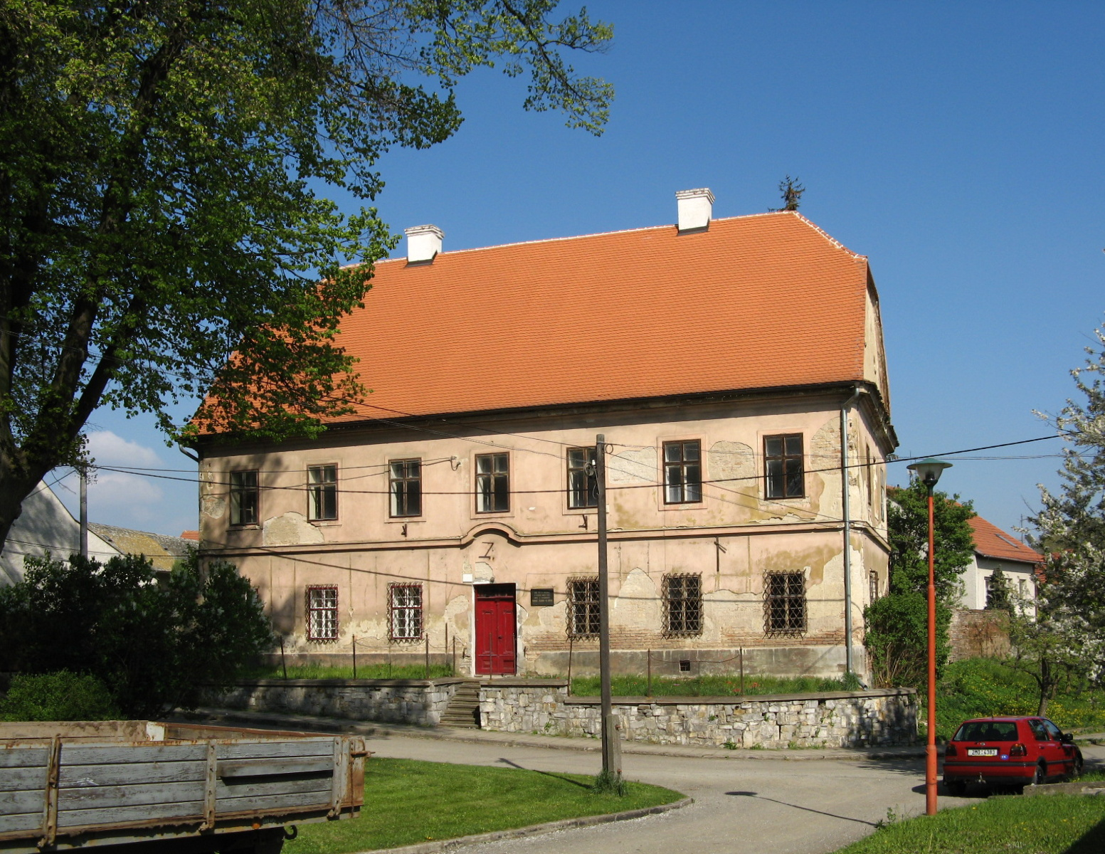 Fara (Dubany), Dubany 4